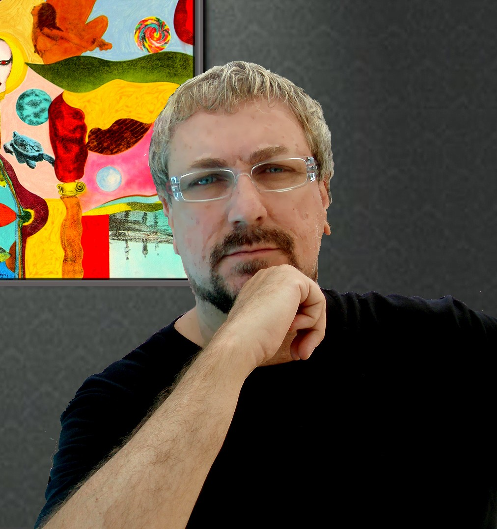 “Hay un cayuco en el estanque del jardín”, de la serie “Perdidas en el Paraiso” con el autor: Jaime Roig de Diego